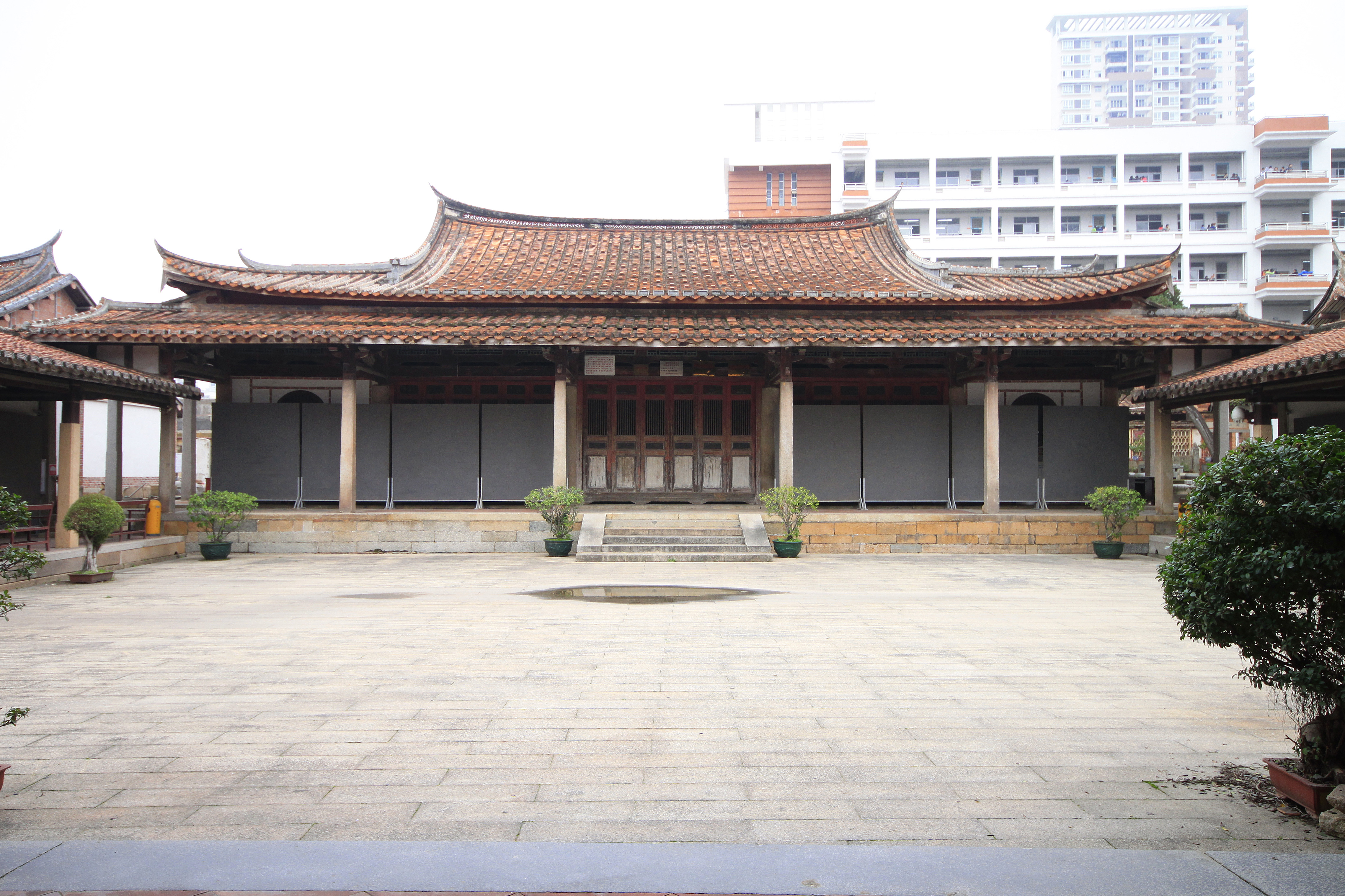 元妙观三清殿，位于中国福建省莆田市